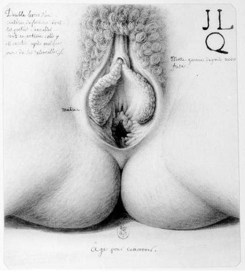 Âge pour concevoir, dessin anatomique, appartenant à une suite reprenant les organes génitaux de la femme, exécuté par Jean-Jacques Lequeu entre 1779 et 1795.